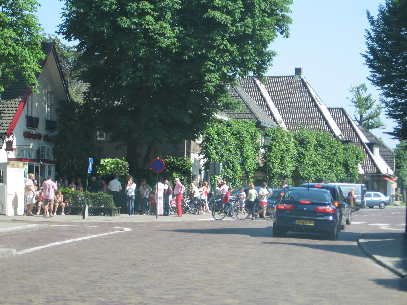 Blaricum, met een rij voor de befaamde ijswinkel, juni 2006